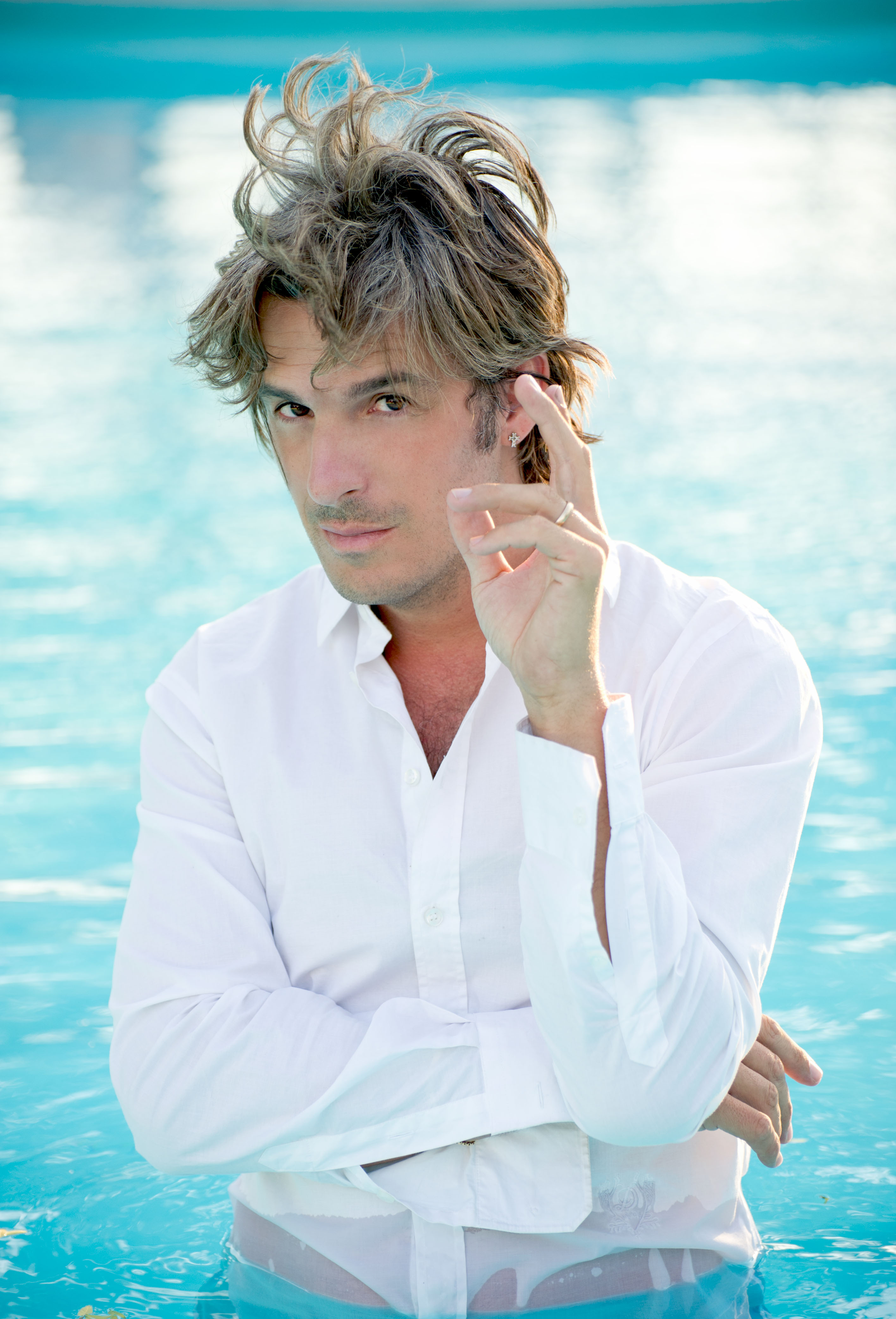 Antonio Casanova